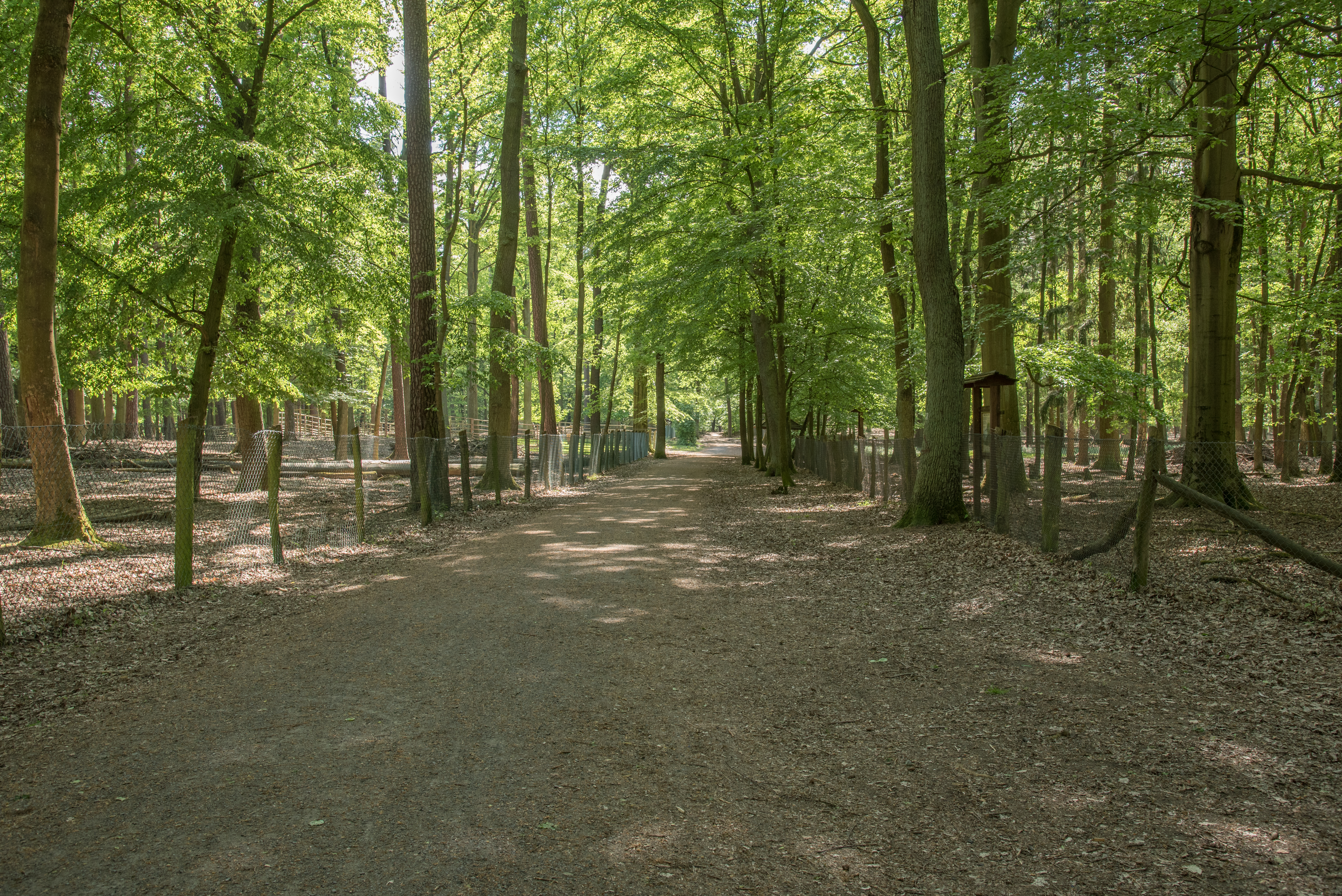 Das Foto zeigt das Wildtierfreihgehege im nördlichen Tegeler Forst. Es ist das Landschaftsschutzgebiet LSG-02a.